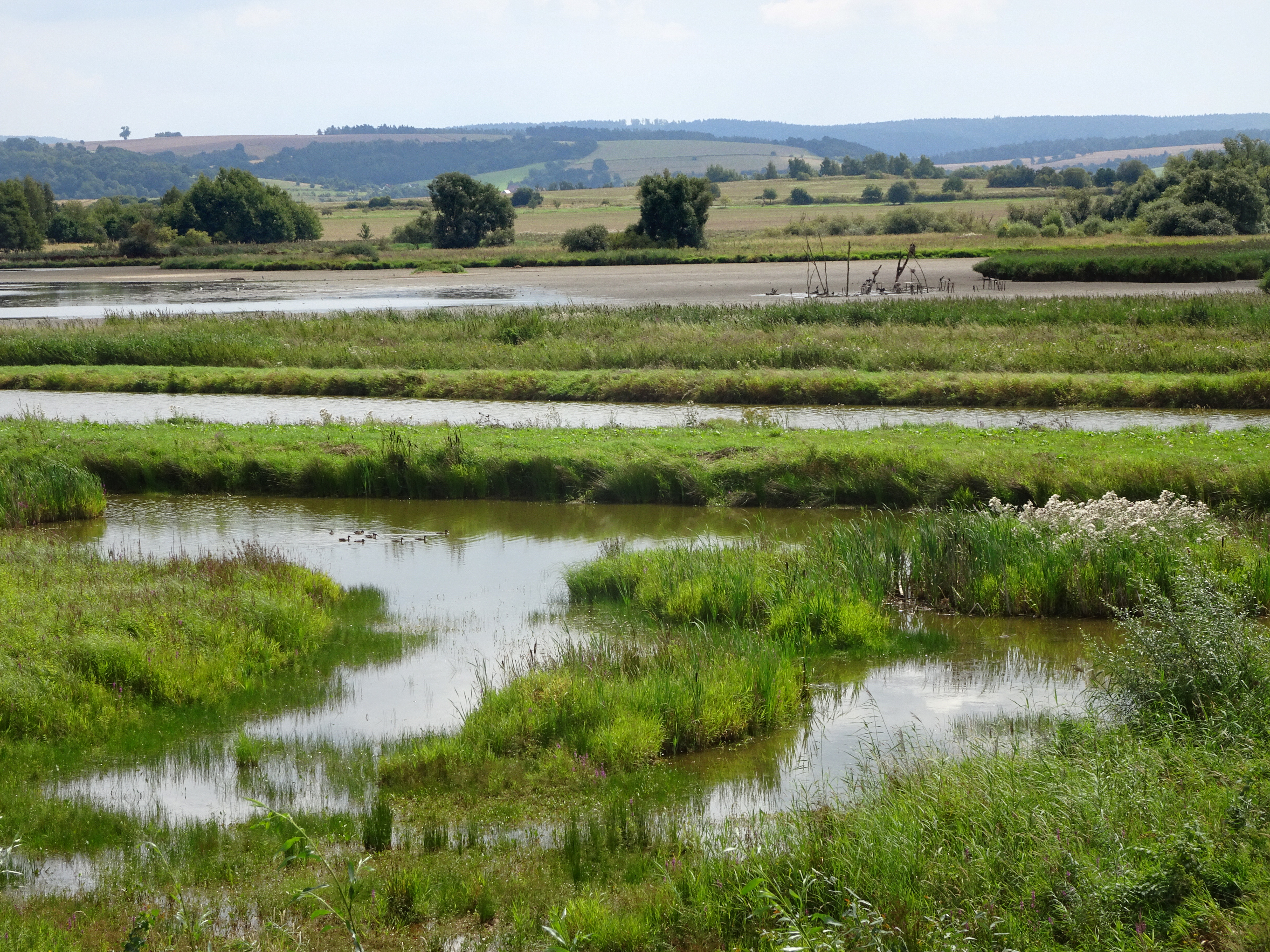 Der „Rhäden bei Obersuhl und Bosserode“ liegt in den Gemarkungen Obersuhl und Bosserode der Gemeinde Wildeck im nordosthessischen Landkreis Hersfeld-Rotenburg. Auslaugungen von Kalisalzen aus dem, aus marinen Sedimenten entstandenem Zechsteinund tektonische Vorgänge haben zu einem schrittweisen Nachsacken des Untergrunds geführt. Die einstige Sumpflandschaft wurde ab der Mitte des 19. Jahrhunderts trockengelegt und bis in die Nachkriegszeit bearbeitet. Mit dem Ausbau der DDR-Grenzanlagen verfiel das Entwässerungssystem, was zur Aufgabe der landwirtschaftlichen Nutzung führte. In den 1970er Jahren begannen Naturschützer mit den Arbeiten zur Rückführung des Rhädens zu einem Feuchtbiotop, um den in ihrem Bestand bedrohten Pflanzen- und Tierarten einen angemessenen Lebensraum zu sichern. Nach abgeschlossener Rekultivierung war (wieder) eine Auenlandschaft entstanden, die vor allem für Vogelarten als Brut-, Nahrungs- und Rastgebiet überregionale Bedeutung besitzt.